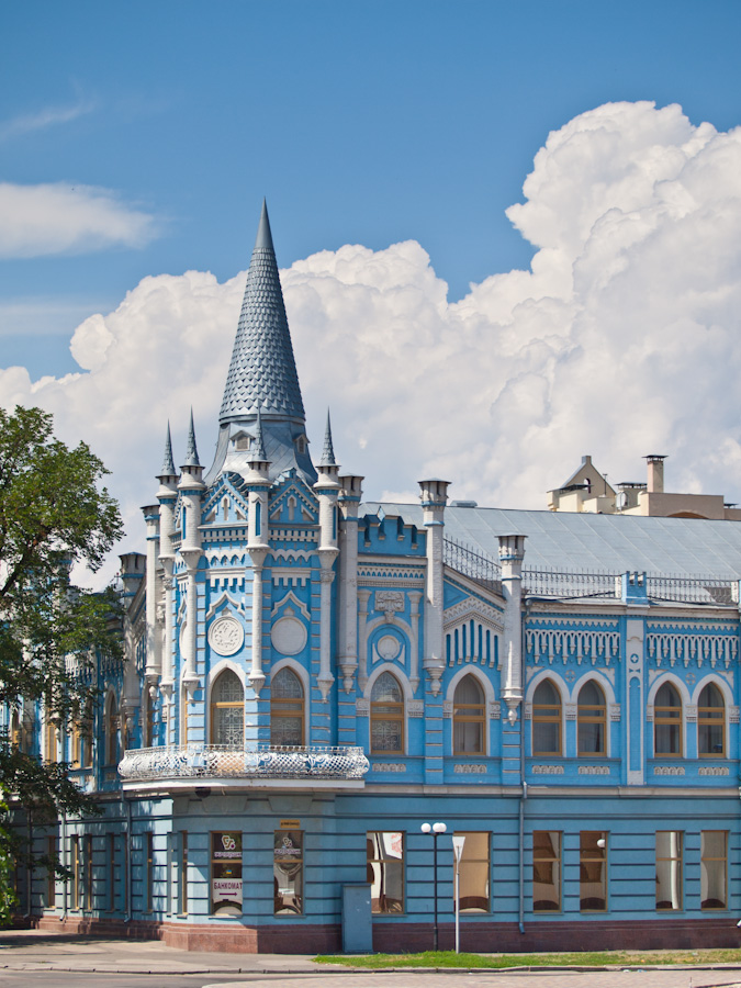 Готель Скорини «Слов’янський» (мур.), Черкаси, вул. О.Дашковича, 20